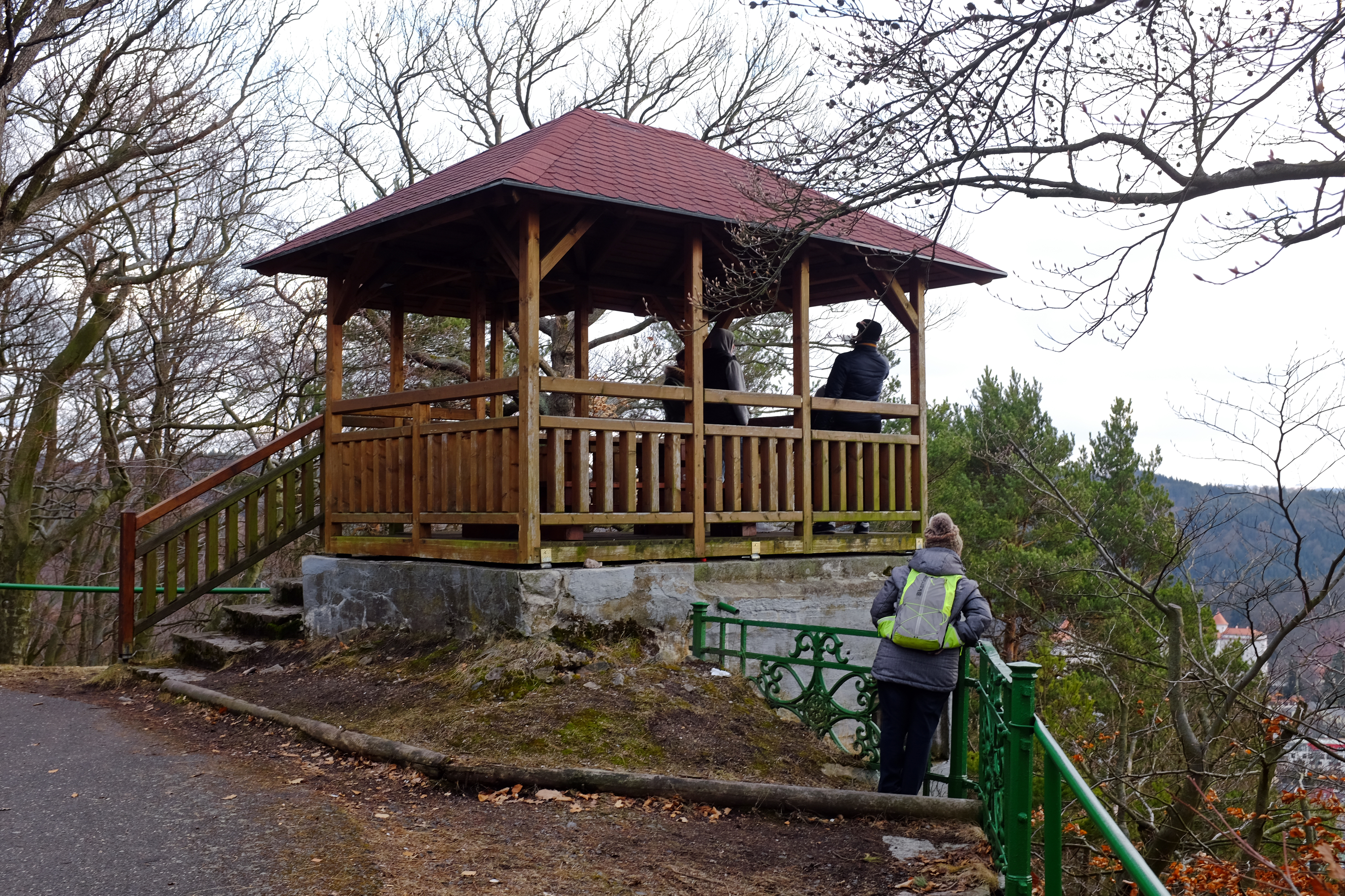 Karlovy Vary, Tři kříže, vyhlídkový altán